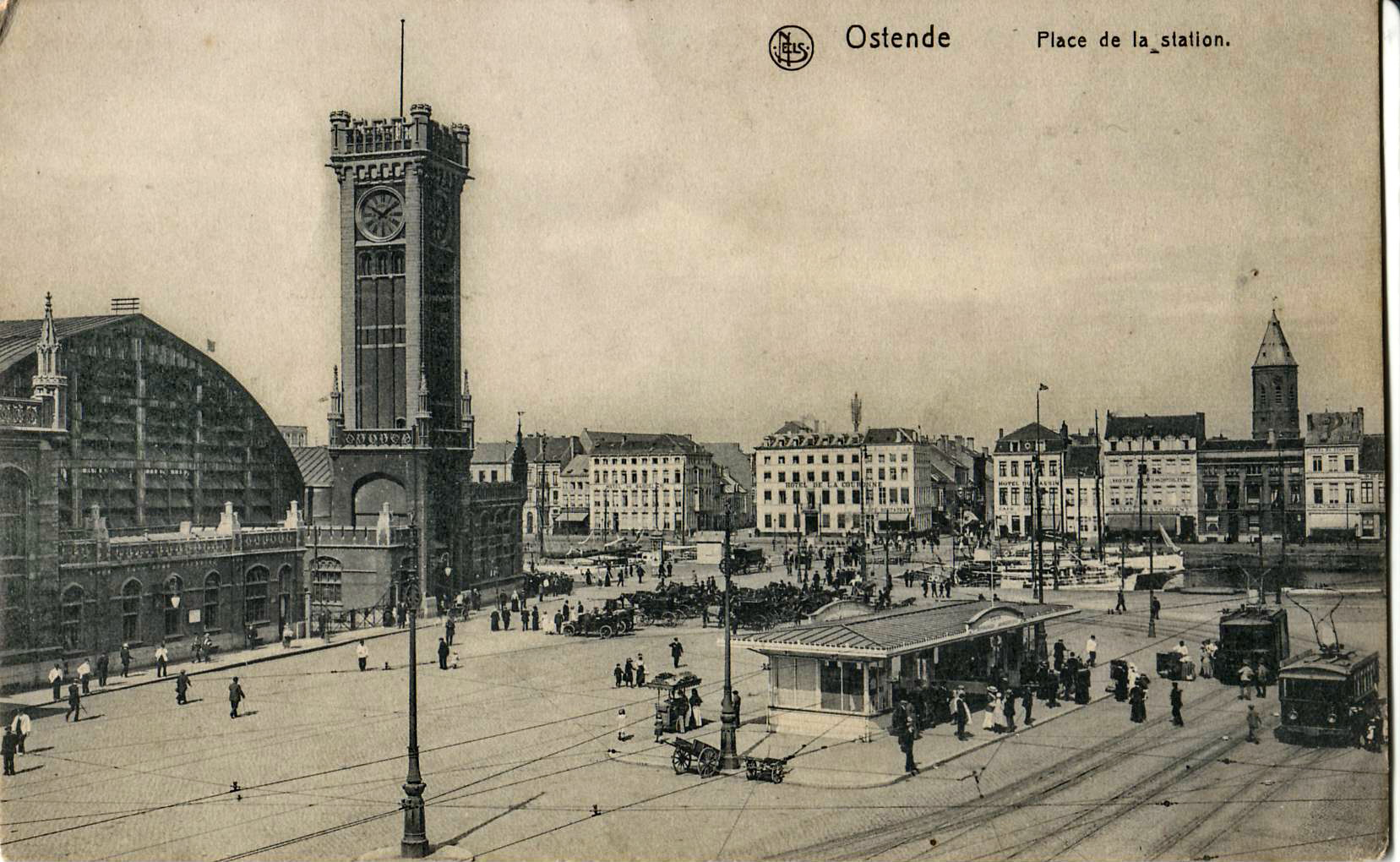 Carte postale ancienne éditée par Nels : OSTENDE - Place de la Station